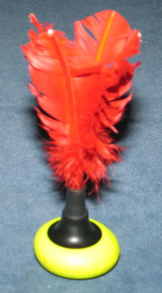 Indiaca